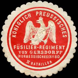 Sealing stamp Title: Königlich Preussisches Füsilier - Regiment von Gersdorff (Kurhessisches) No. 80 - II. Bataillon Description: rot, weiß, geprägt Place: Wiesbaden, Bad Homburg v. d. Höhe size: 4 cm